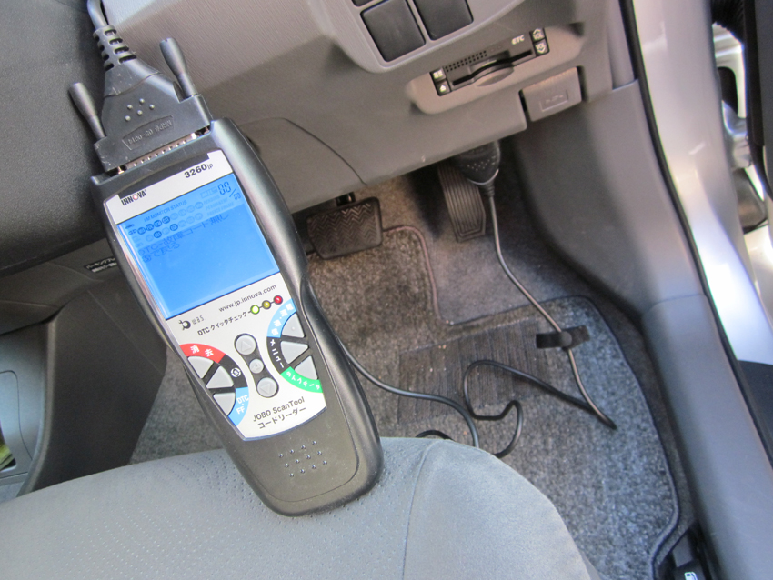 運転席のDTC（データリンクコネクター）に接続したOBD2スキャンツール